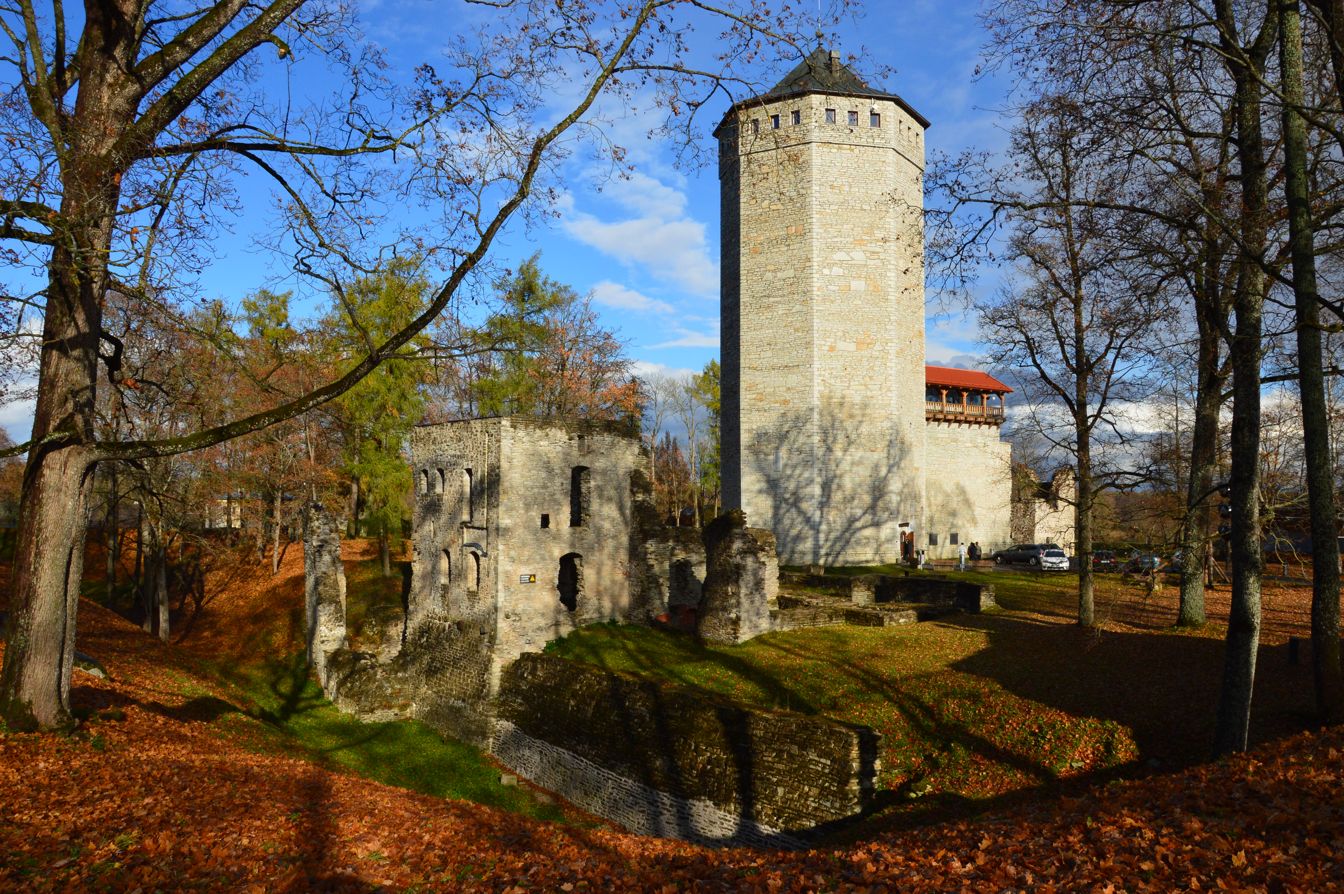 Paide ordulinnuse varemed